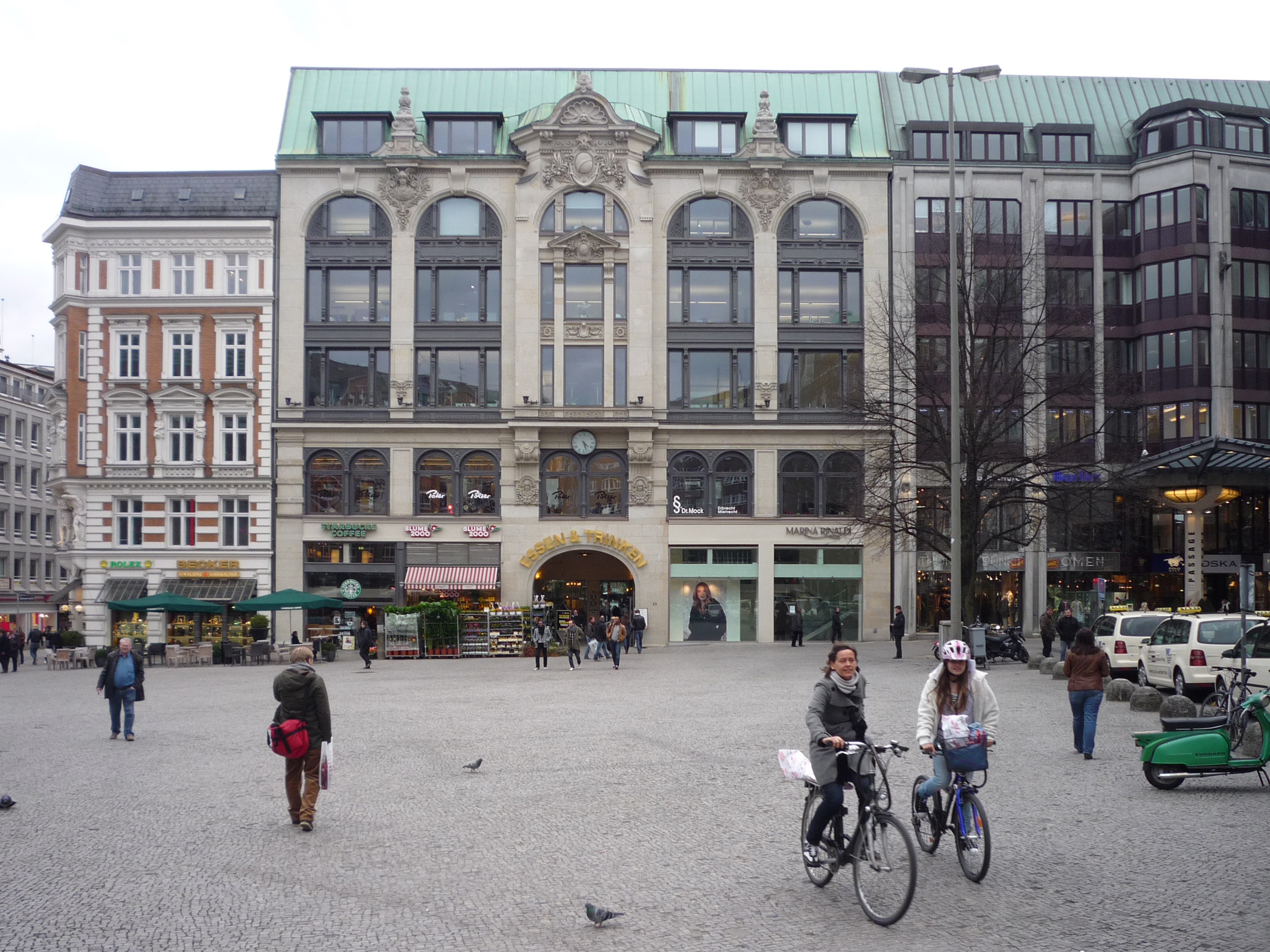 Hamburg Neustadt: Gänsemarkt Südseite zwischen ABC-Straße und Gerhofstraße This is a photograph of an architectural monument.